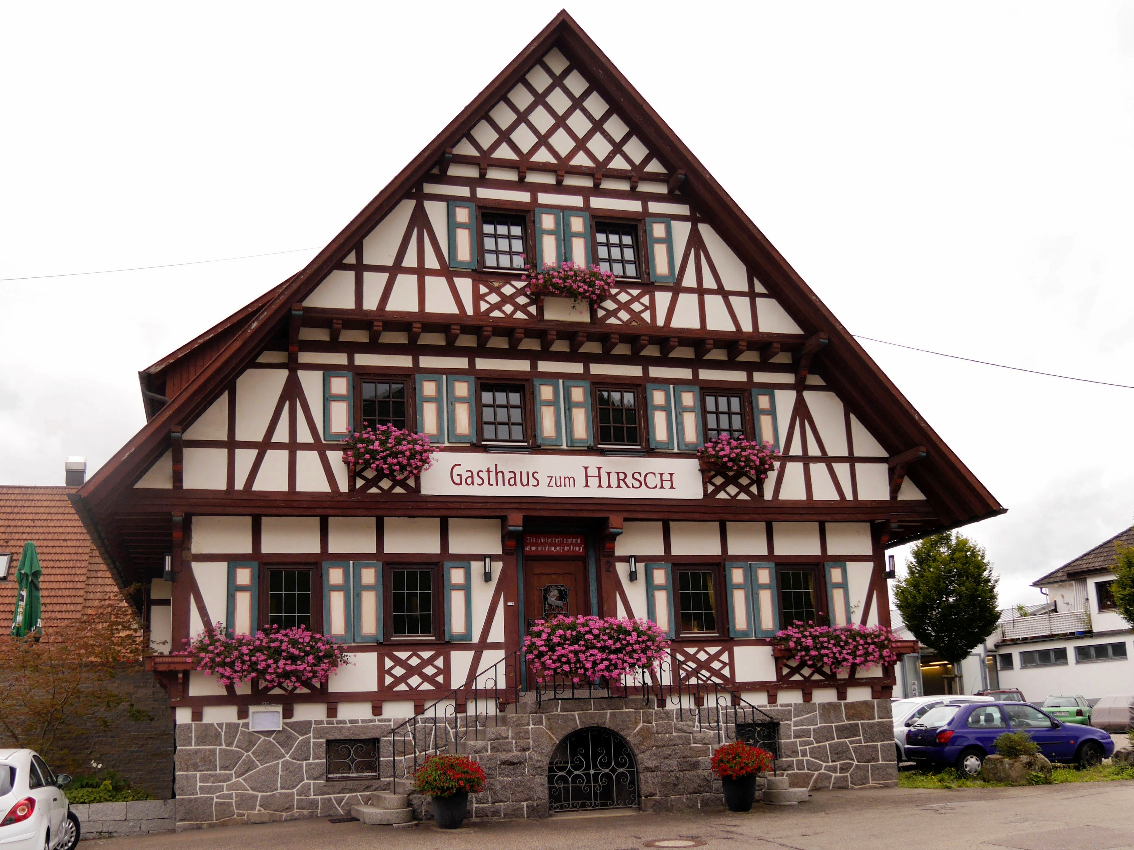 Gasthaus zum Hirsch in Gutach (Schwarzwaldbahn).